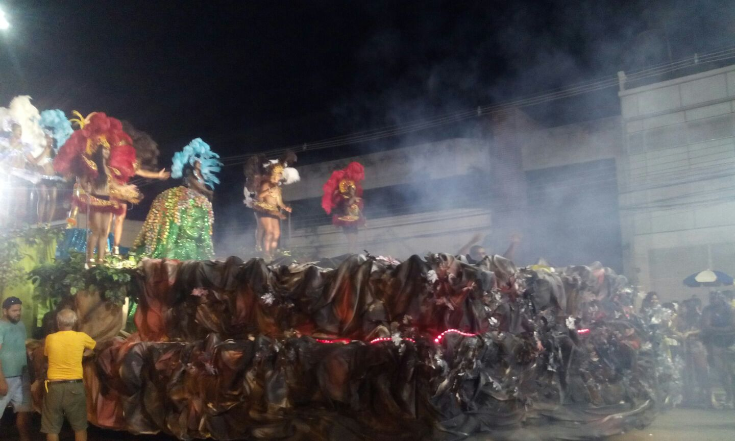 GRES União de Maricá